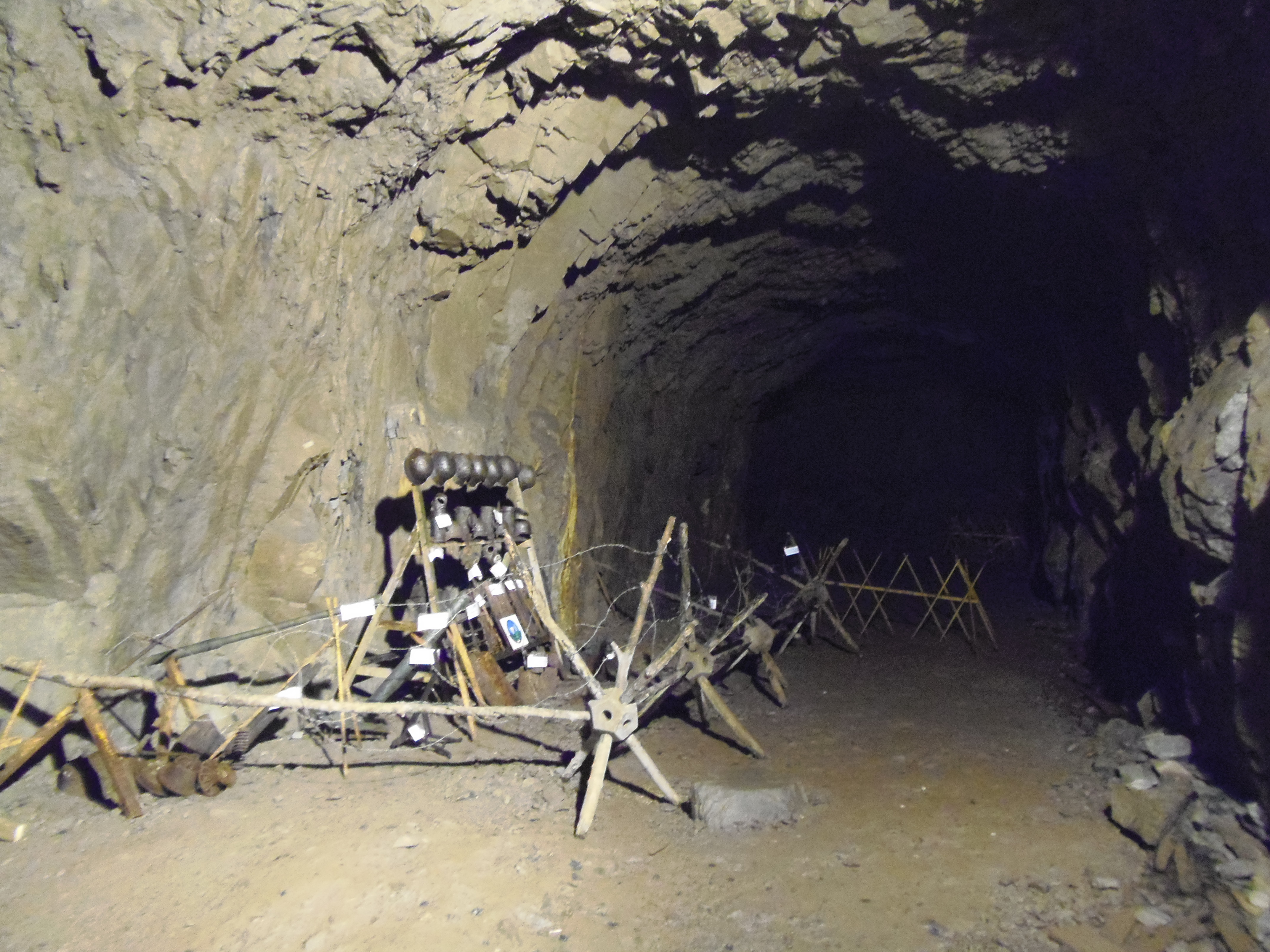 Arsenał broni w podziemnym mieście Hitlera w Osówce